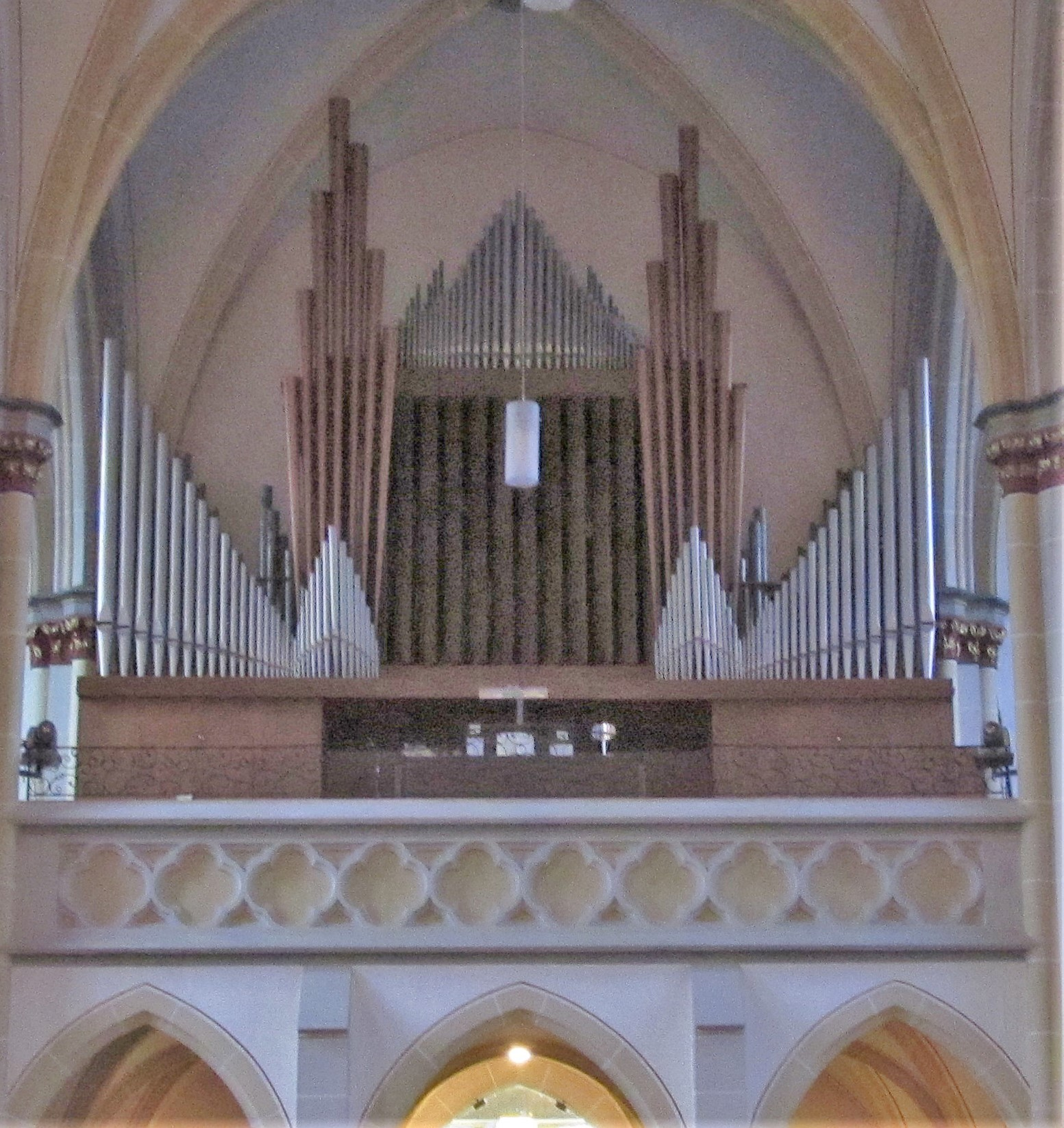 Orgelempore der katholischen Pfarrkirche St. Marien (Mariä Himmelfahrt) in Dudweiler, einem Stadtteil von Saarbrücken, Saarland